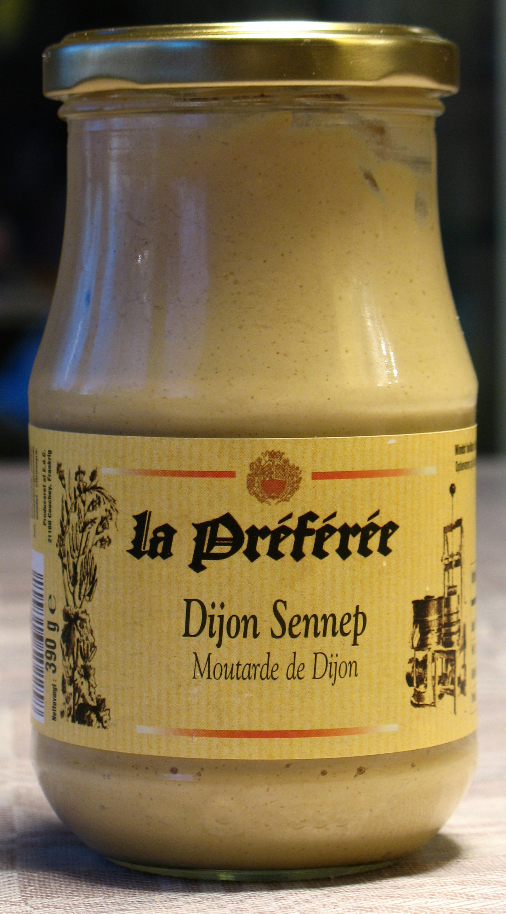 A jar of Dijon mustard. Image taken on 2007-04-13 in Lund, Sweden.